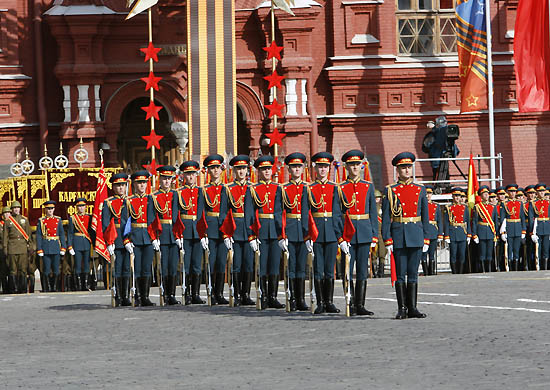 Отдельный комендантский полк на Красной площади 9 мая 2010 года